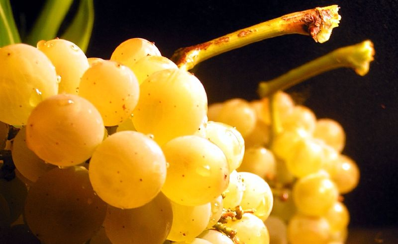 Bijelo grožđe